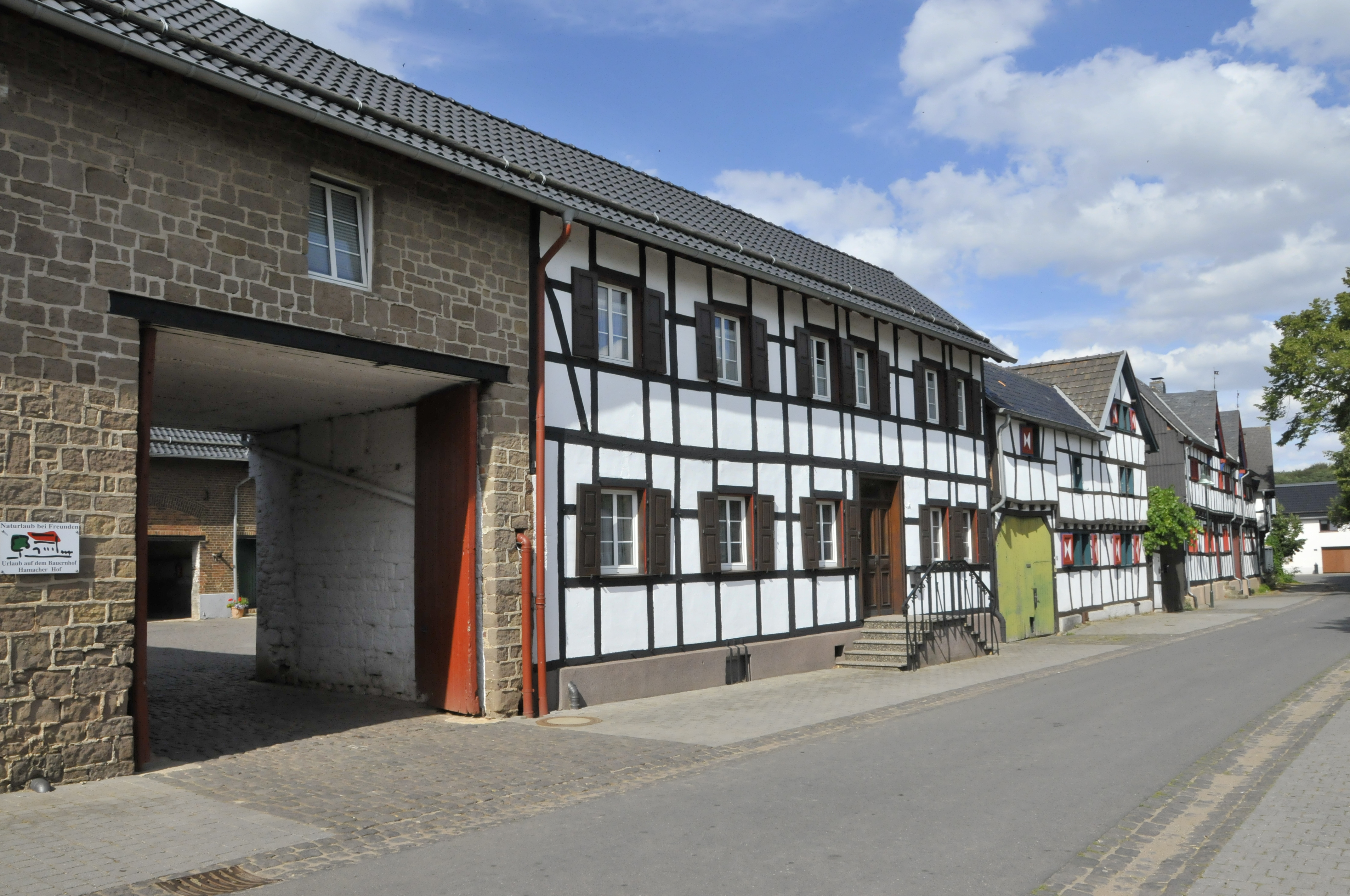 Merzkirchen-Hostel